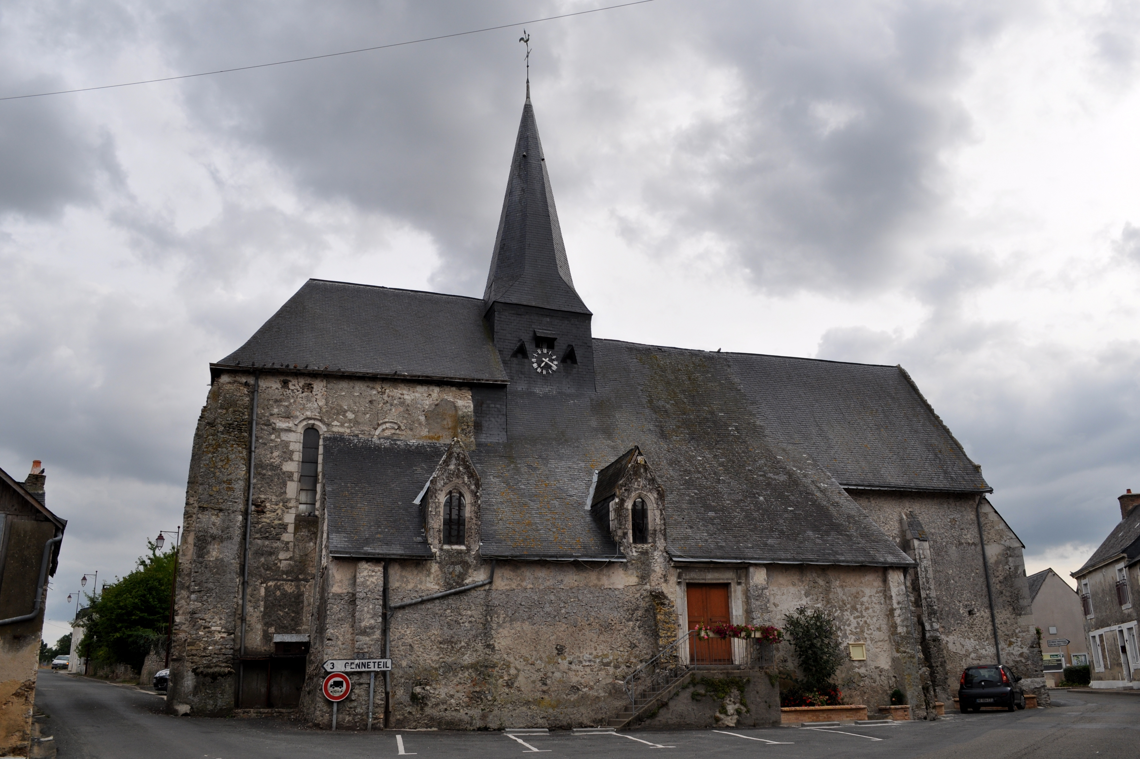 Eglise Saint-Loup de Savigné-sous-le-Lude (Sarthe)